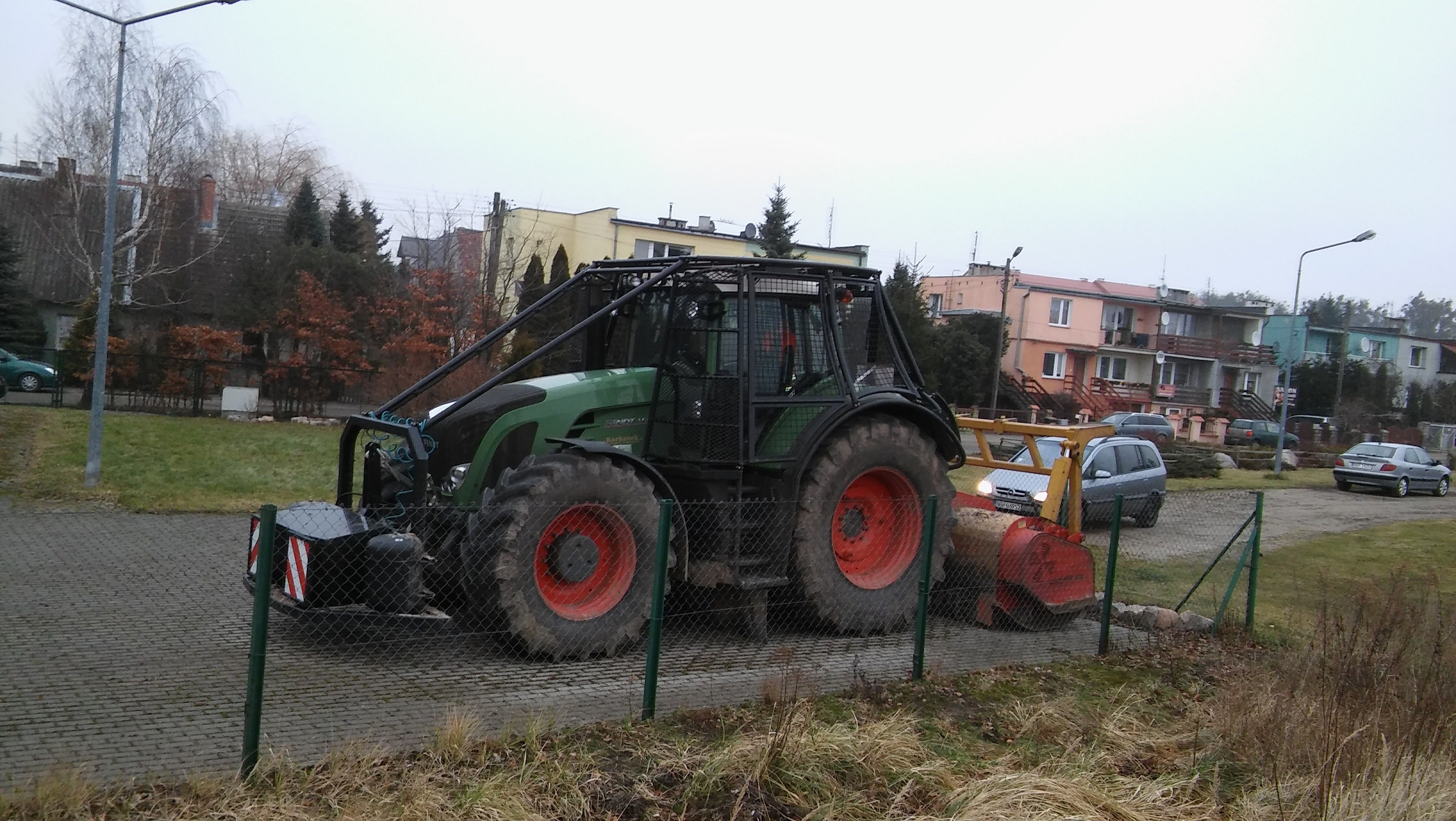 Klatka bezpieczeństwa traktor